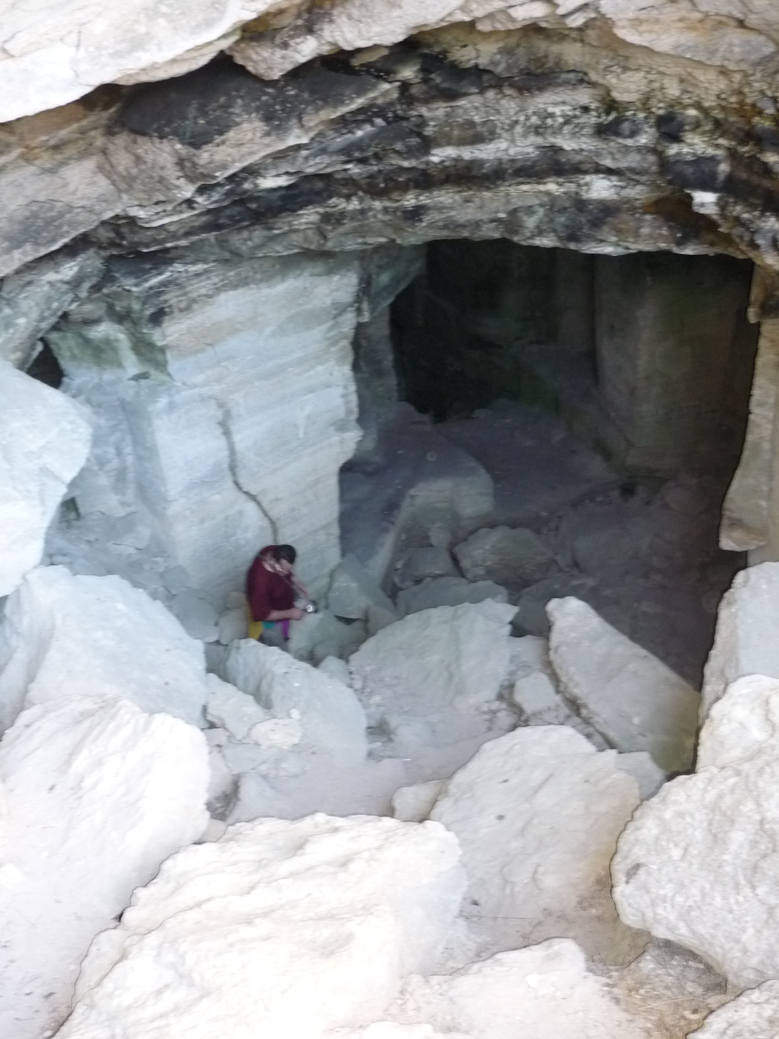 Акмонайские катакомбы